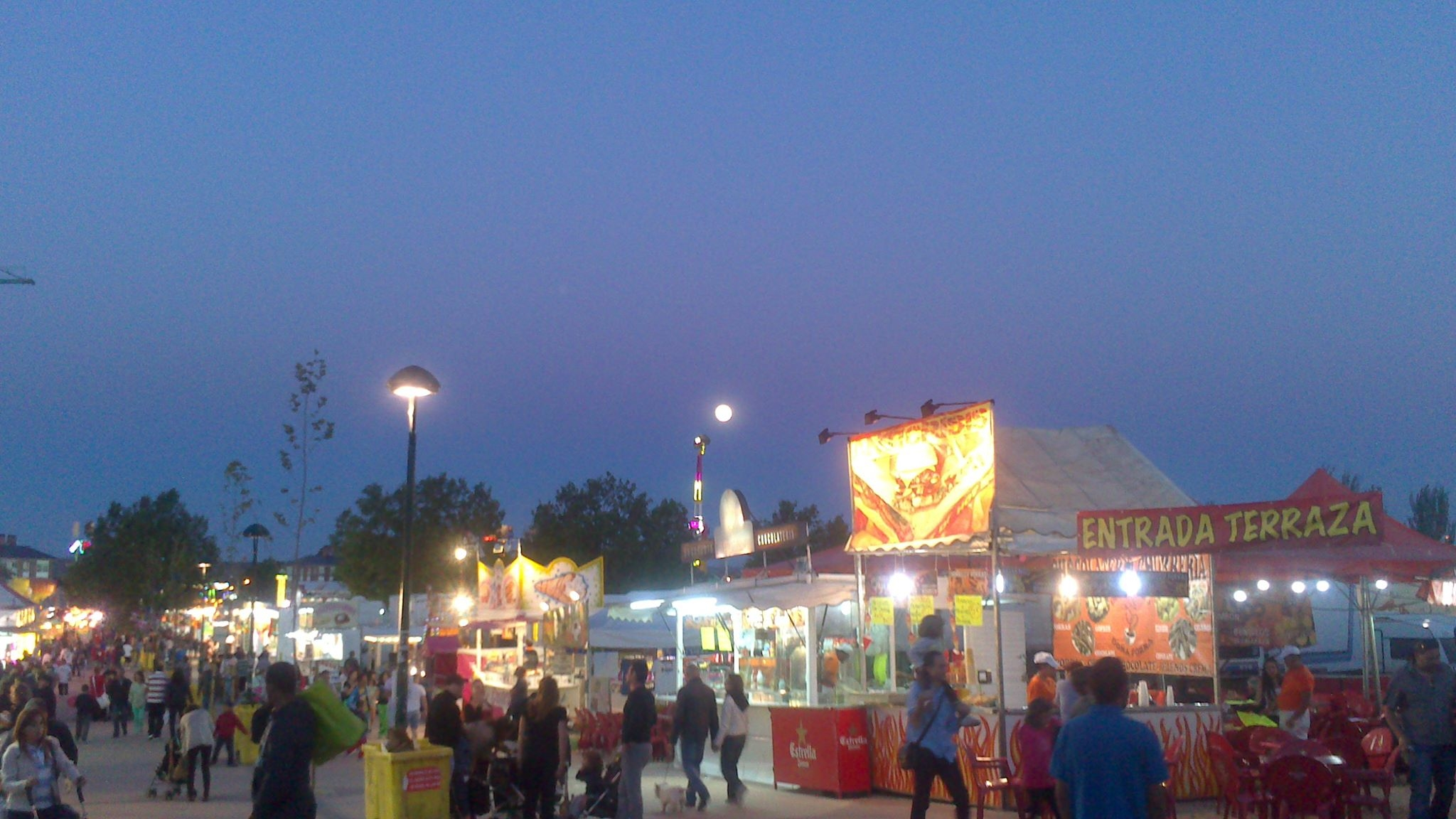 La feria del Real Sitio de San Fernando se desarrolla con ocasión de las fiestas patronales a finales de mayo y es una de las más populosas de la comarca del Corredor del Henares en Madrid.